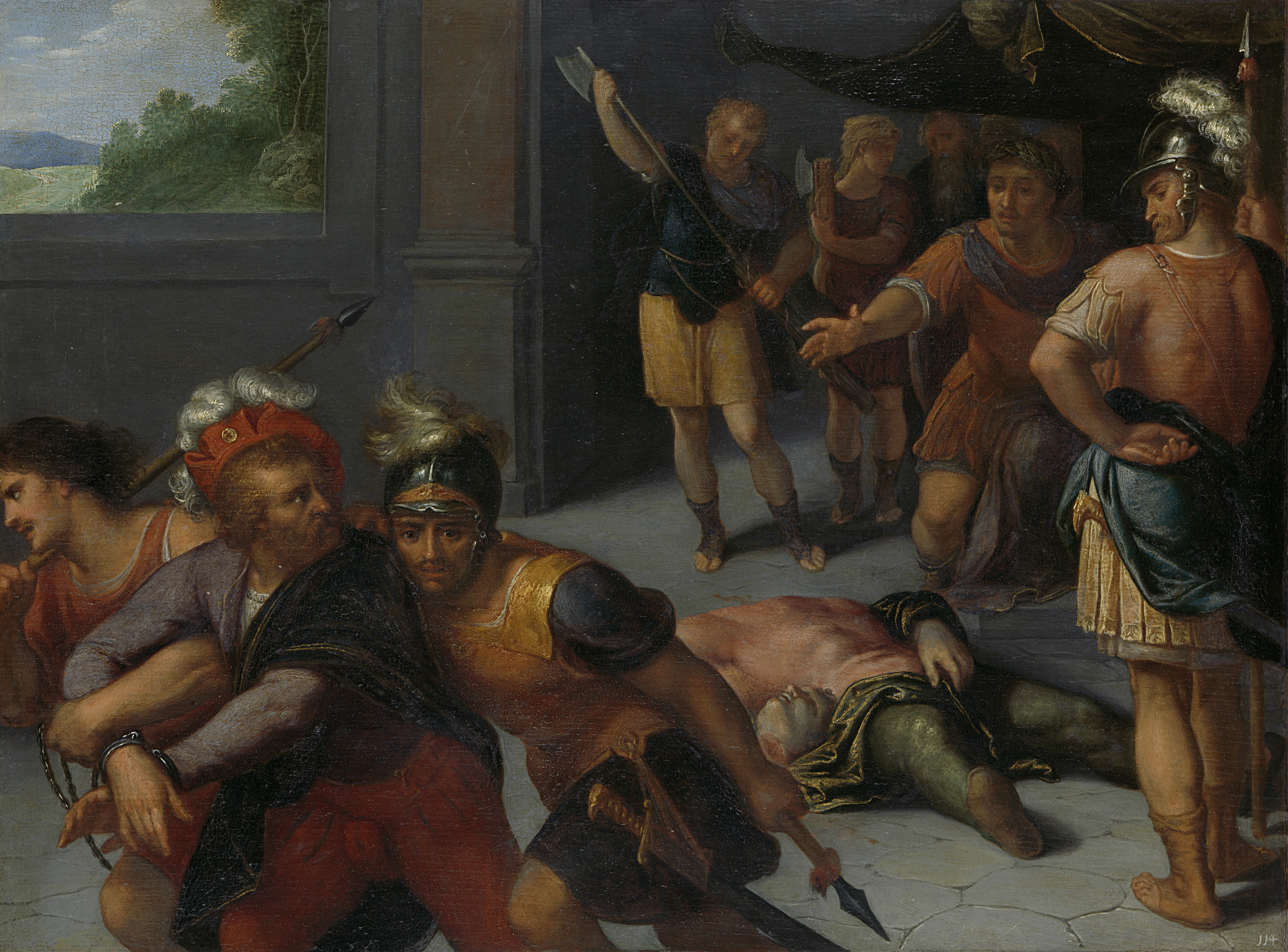 De onthoofding van Julius Paulus en de gevangenneming van Claudius Civilis. Het onthoofde lichaam van Julius Paulus ligt op de vloer tussen enkele Romeinse soldaten, links bergt de beul zijn bijl op. Op de voorgrond wordt Claudius Civilis door soldaten weggevoerd. Eerste voorstelling in een reeks van twaalf taferelen van de opstand van de Batavieren tegen de Romeinen (SK-A-421/432), aangekocht door de Staten-Generaal in 1613.